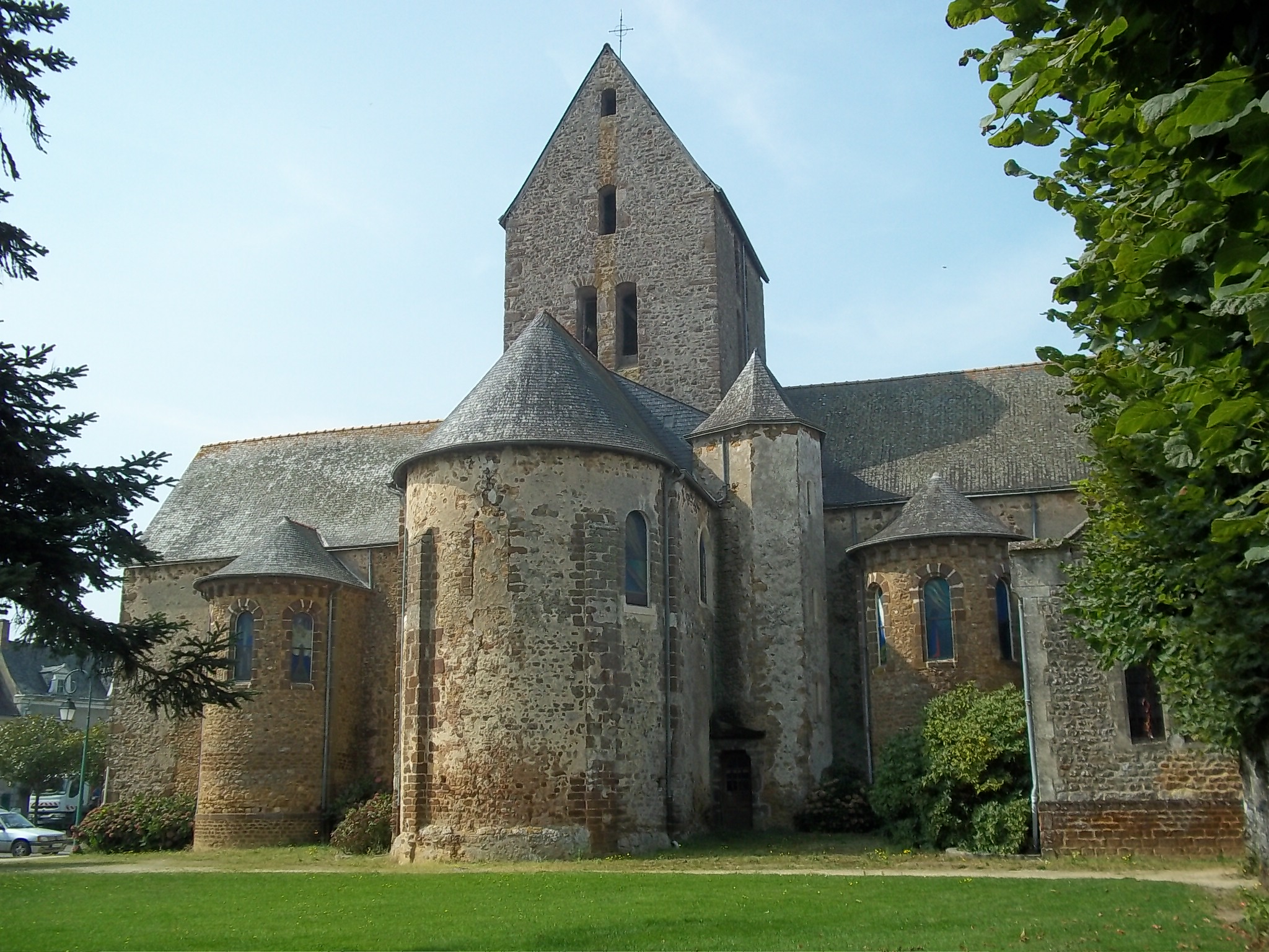 Eglise de Brulon